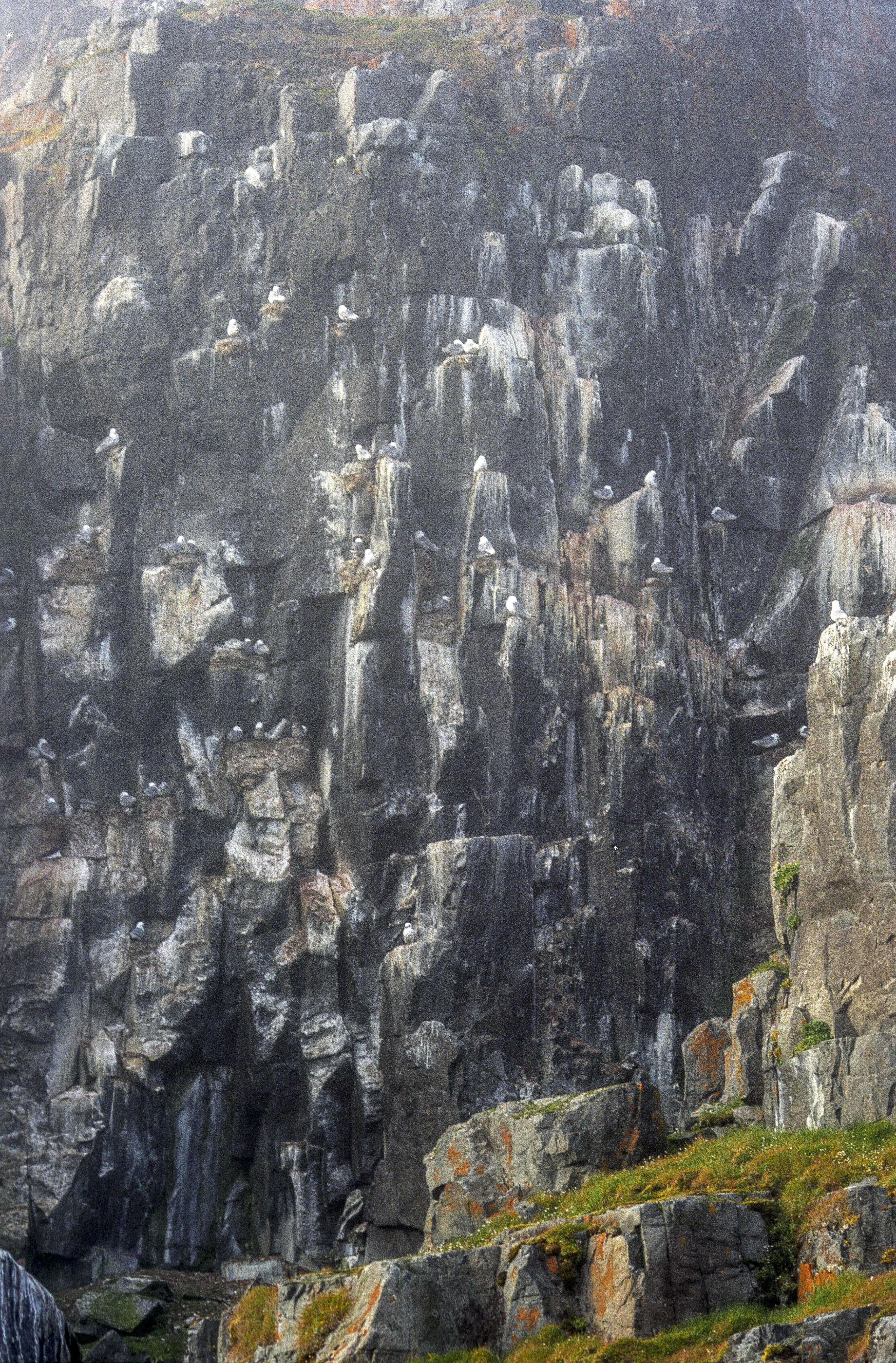 Rissa tridactyla, Spitsbergen, Alkefjellet